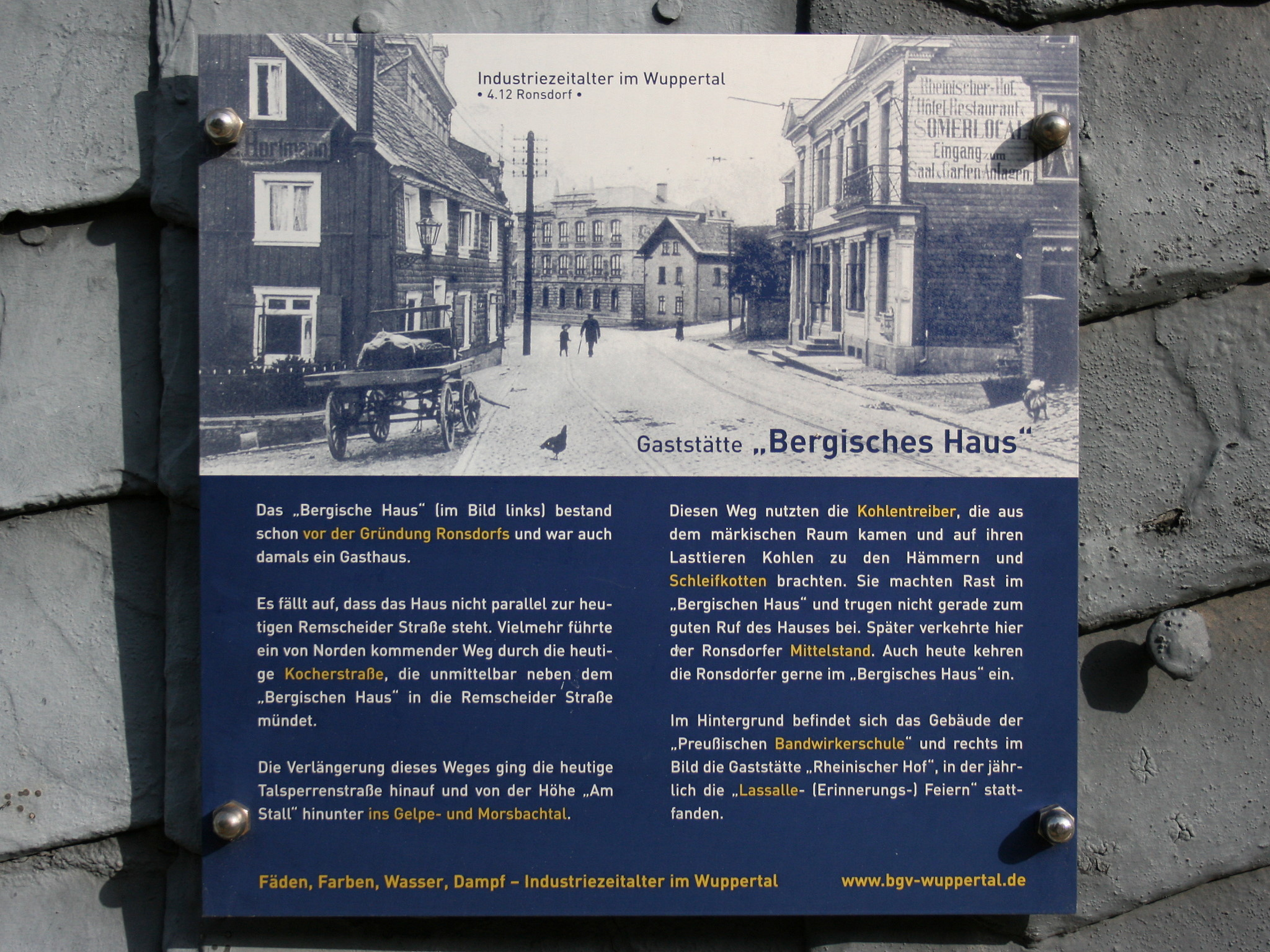 Wuppertal-Ronsdorf: Restaurant Zum Bergischen Haus